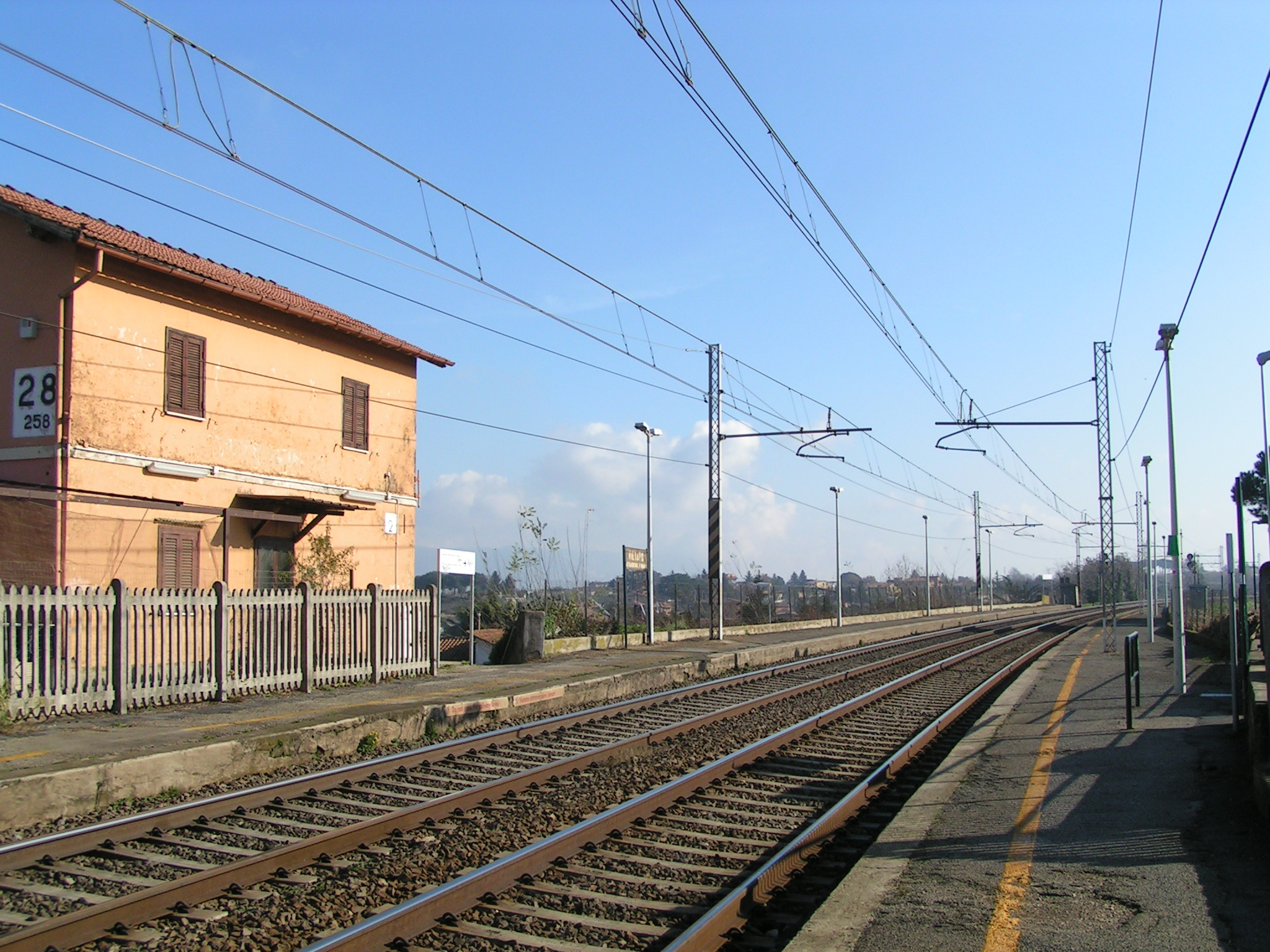 Stazione ferroviaria di Colonna Galleria